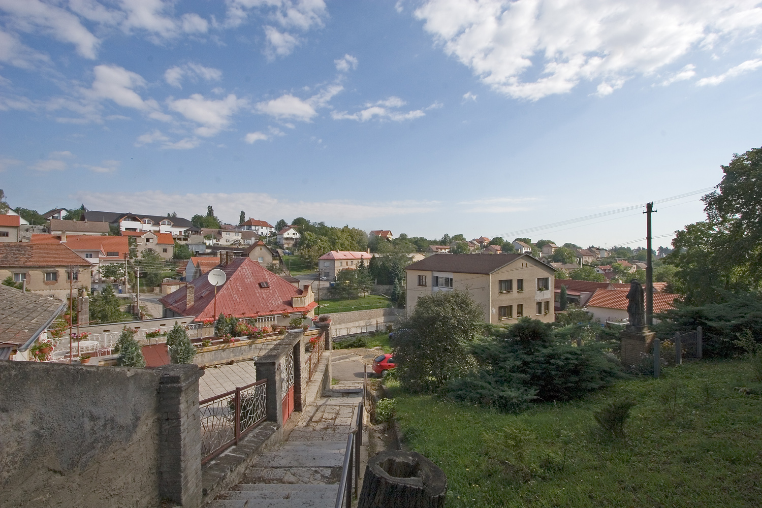 Pohled na obec Kosoř